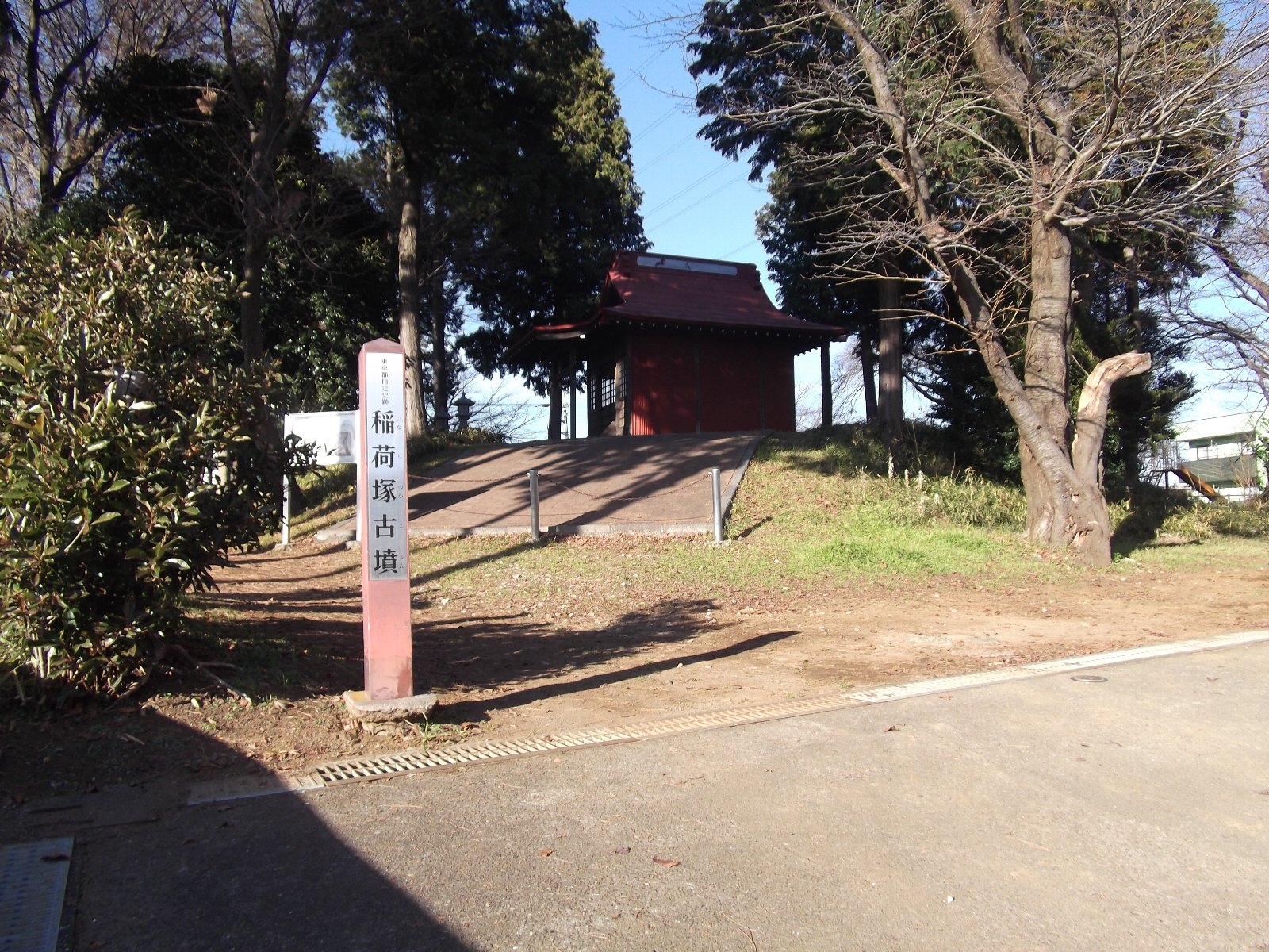 稲荷塚古墳。東京都多摩市。